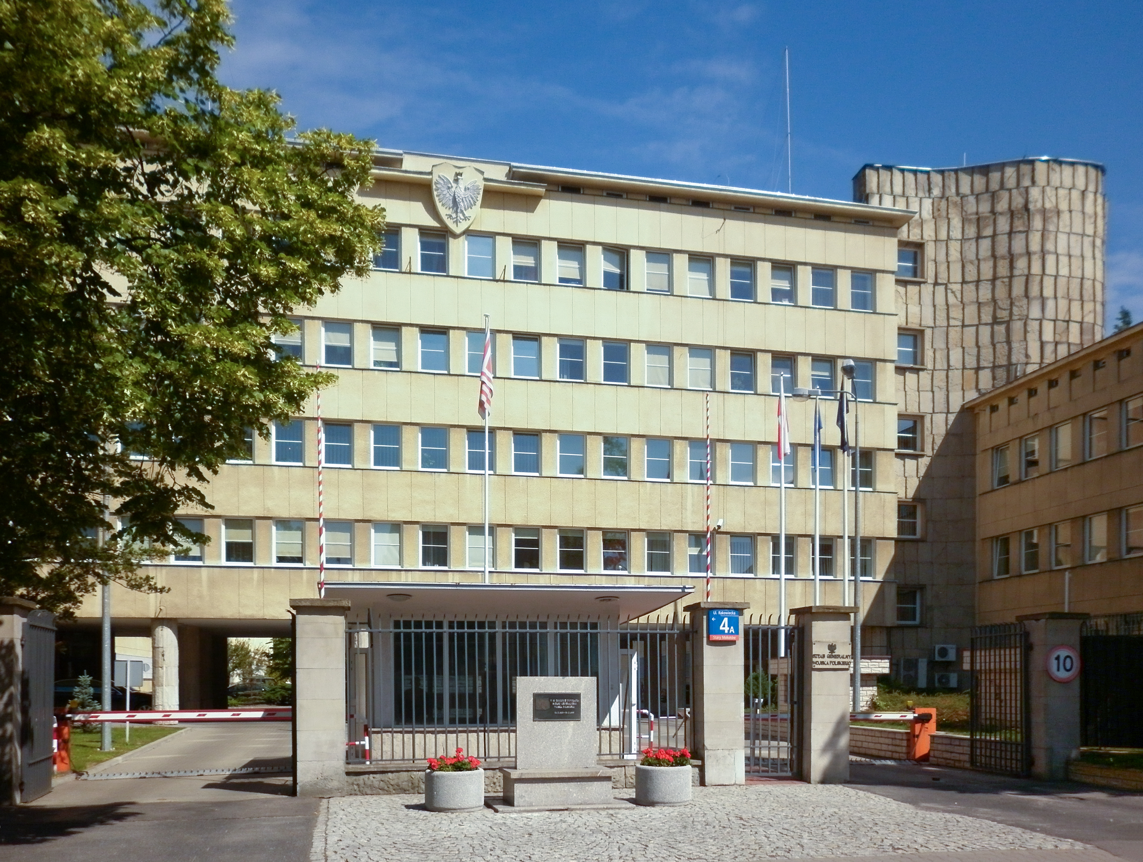 Sztab Generalny Wojska Polskiego przy ulicy Rakowieckiej